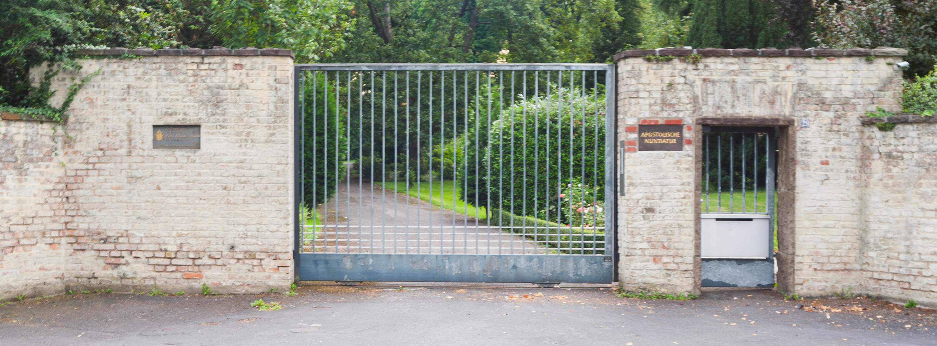 Eingangstor des Turmhofs, Turmstraße 29–31, Bonn-Plittersdorf